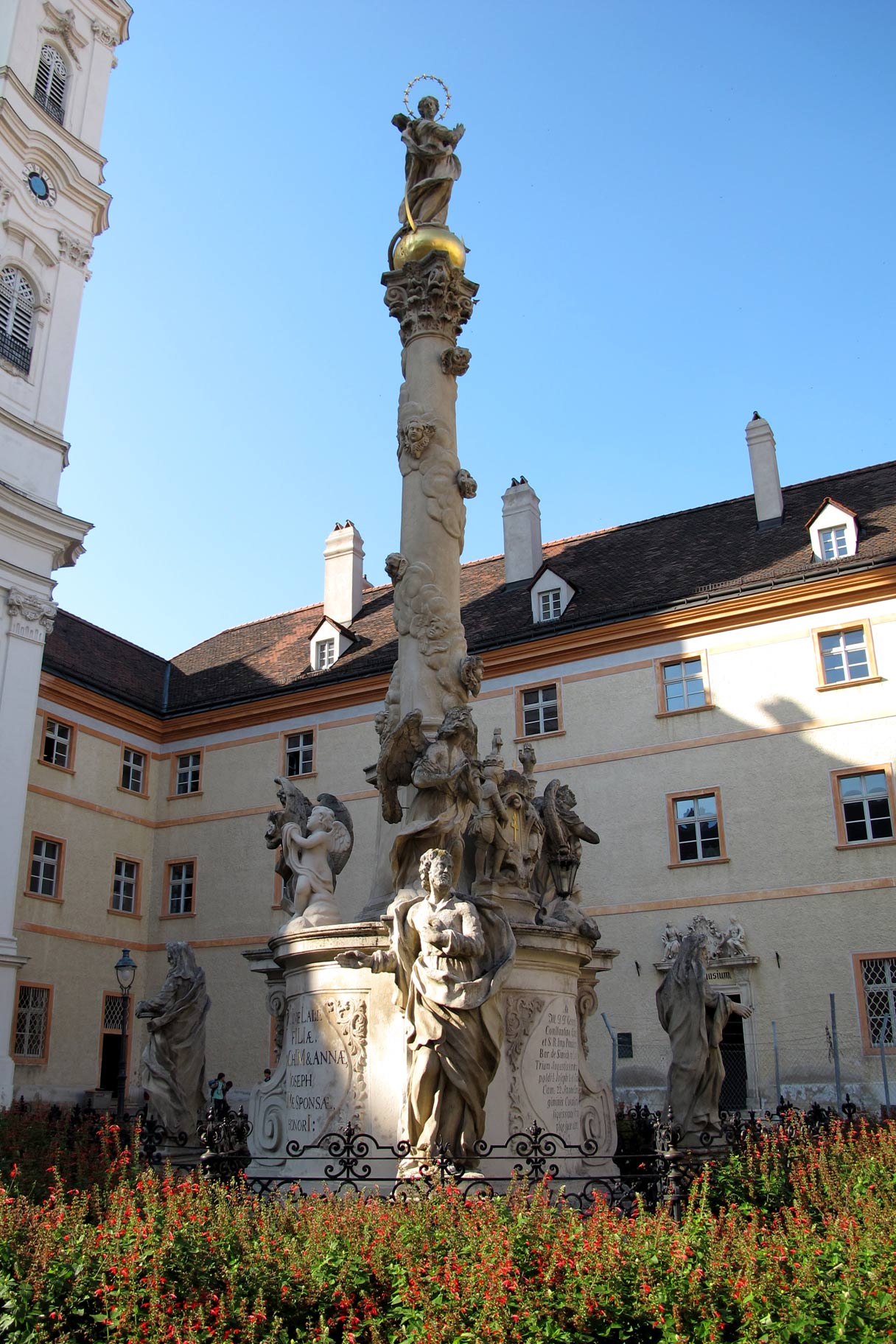 Mariensäule